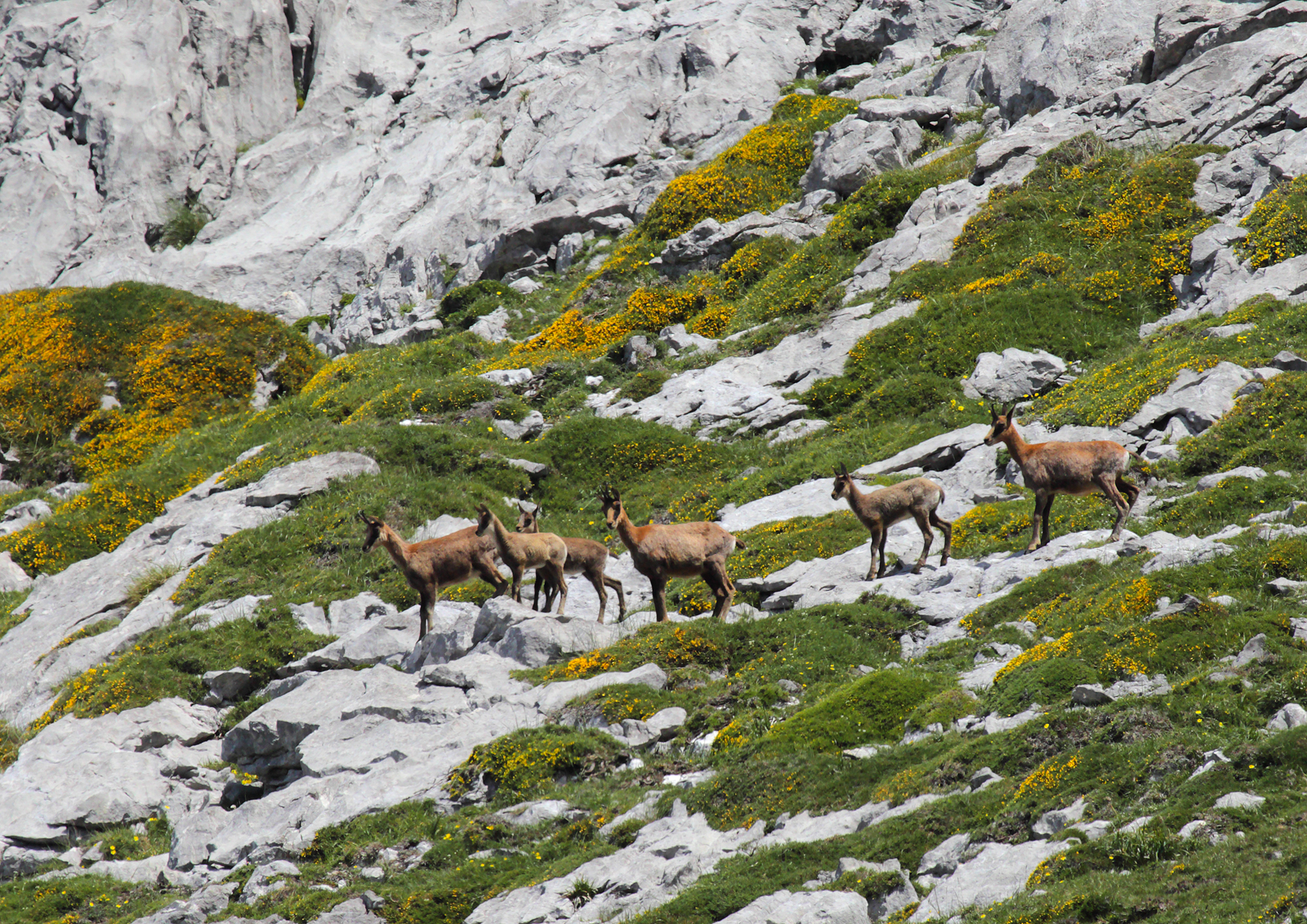 Rebecos en las praderas de Ordiales